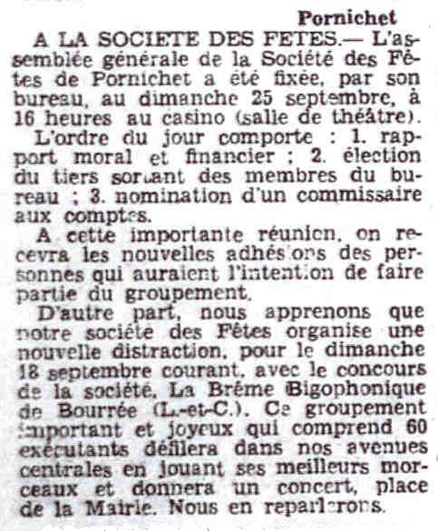 Nouvelles de Pornichet avec la venue de la Brême Bigophoniqsue de Bourré.